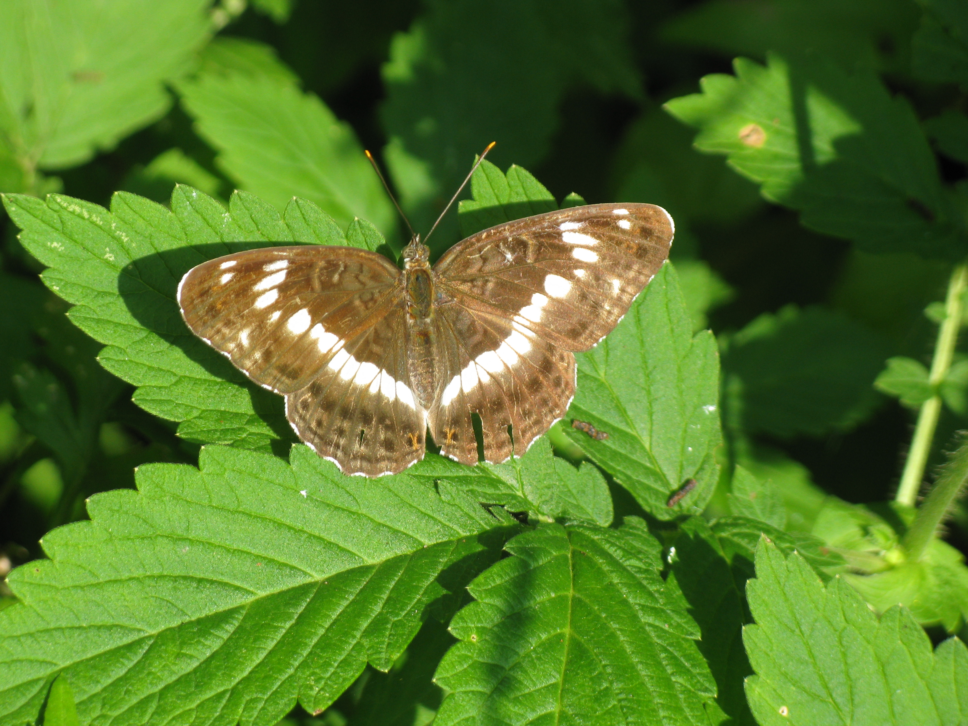 Ladoga camilla japonica